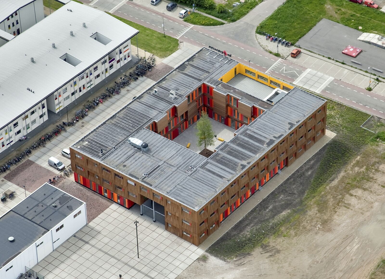 luchtfoto van het 4e Gymnasium